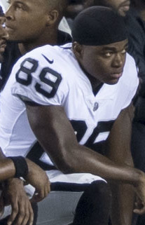 Raiders at Redskins 9/24/17